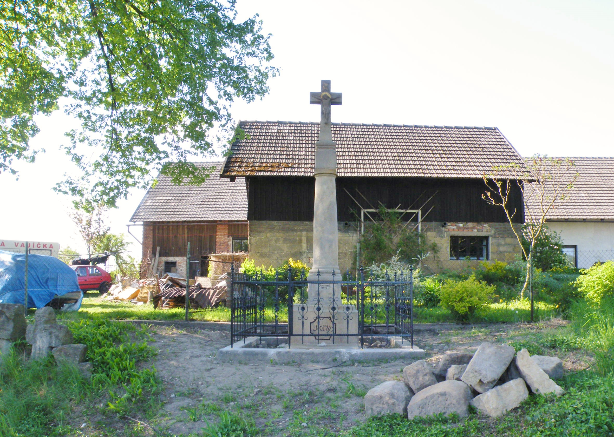 Zábřezí smírčí kříže